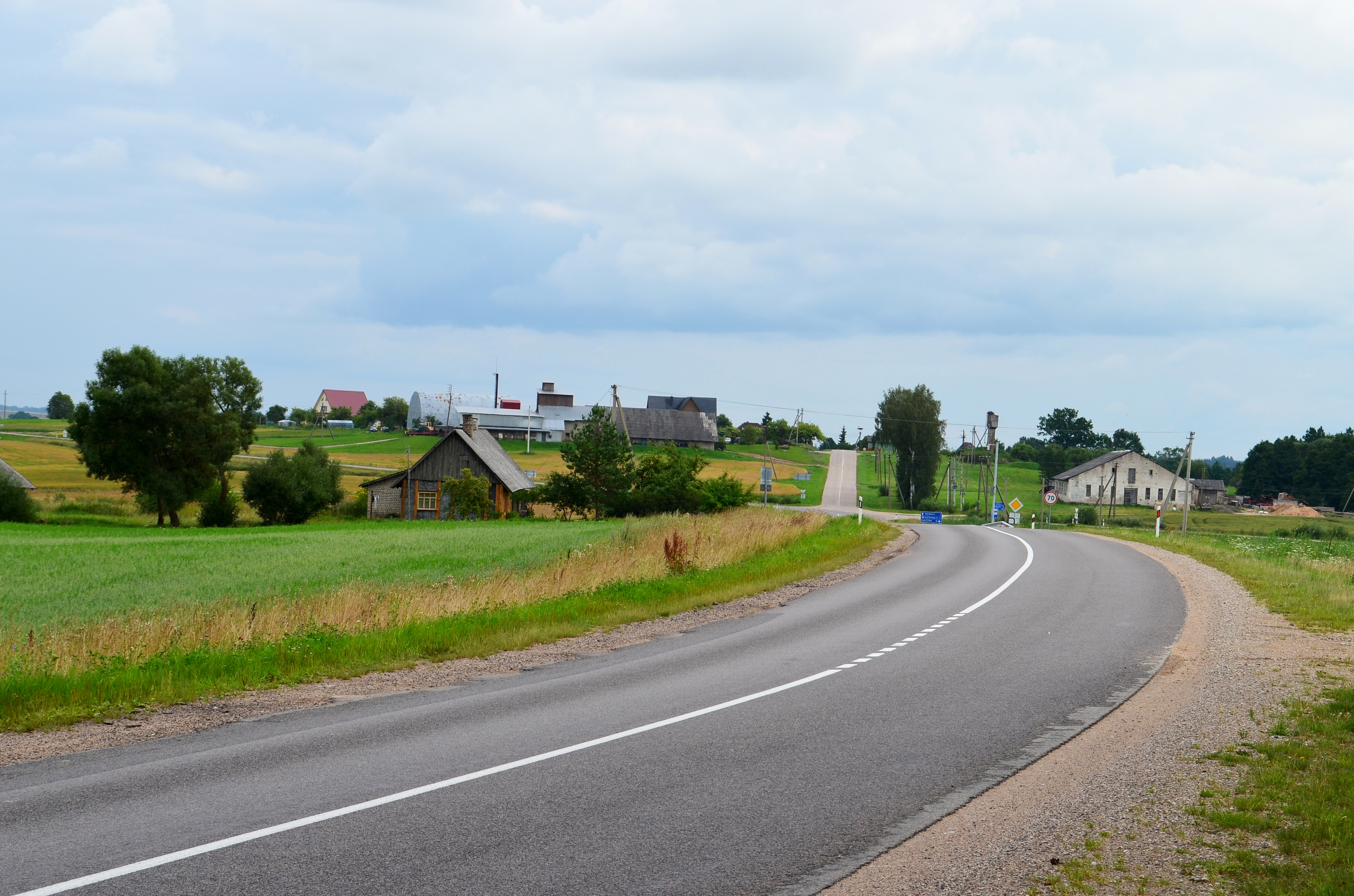 Mikalavo k., N. Daugėliškio sen., Ignalinos raj.